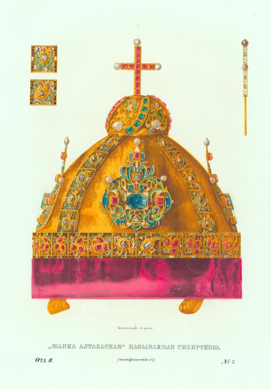 Шапка алтабасная